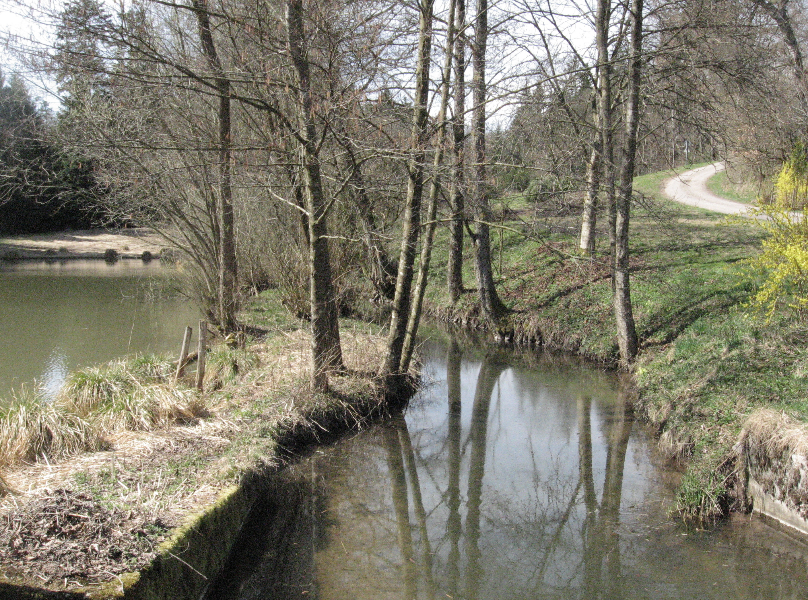 Der von einem kleinen Wehr in Fortsetzung der Dammlinie des Mühlweihers angestaute Hambach an der Bühlerzeller Hambachsägmühle, flussaufwärts gesehen.